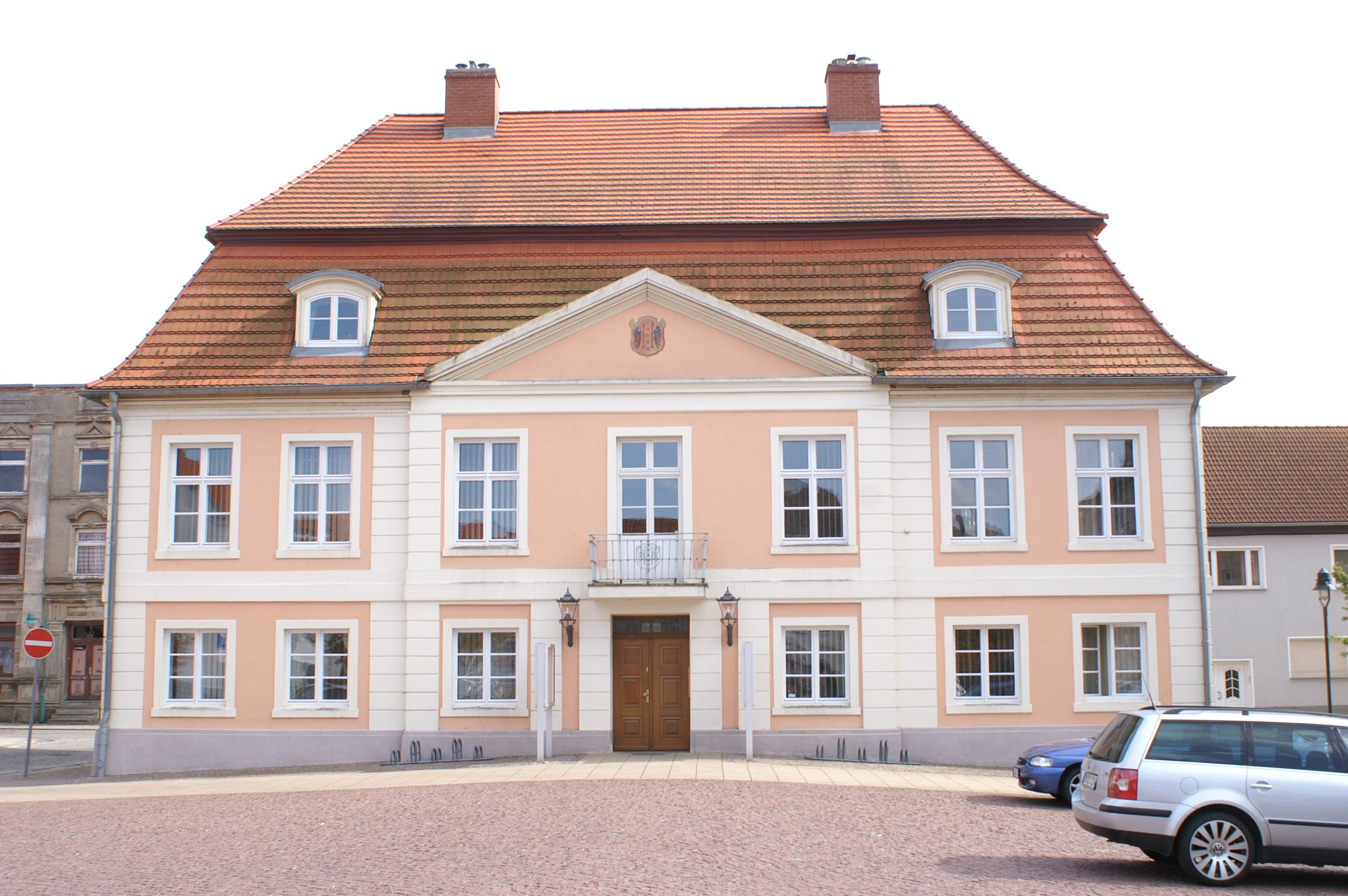 Rathaus der Stadt Loitz (MV)